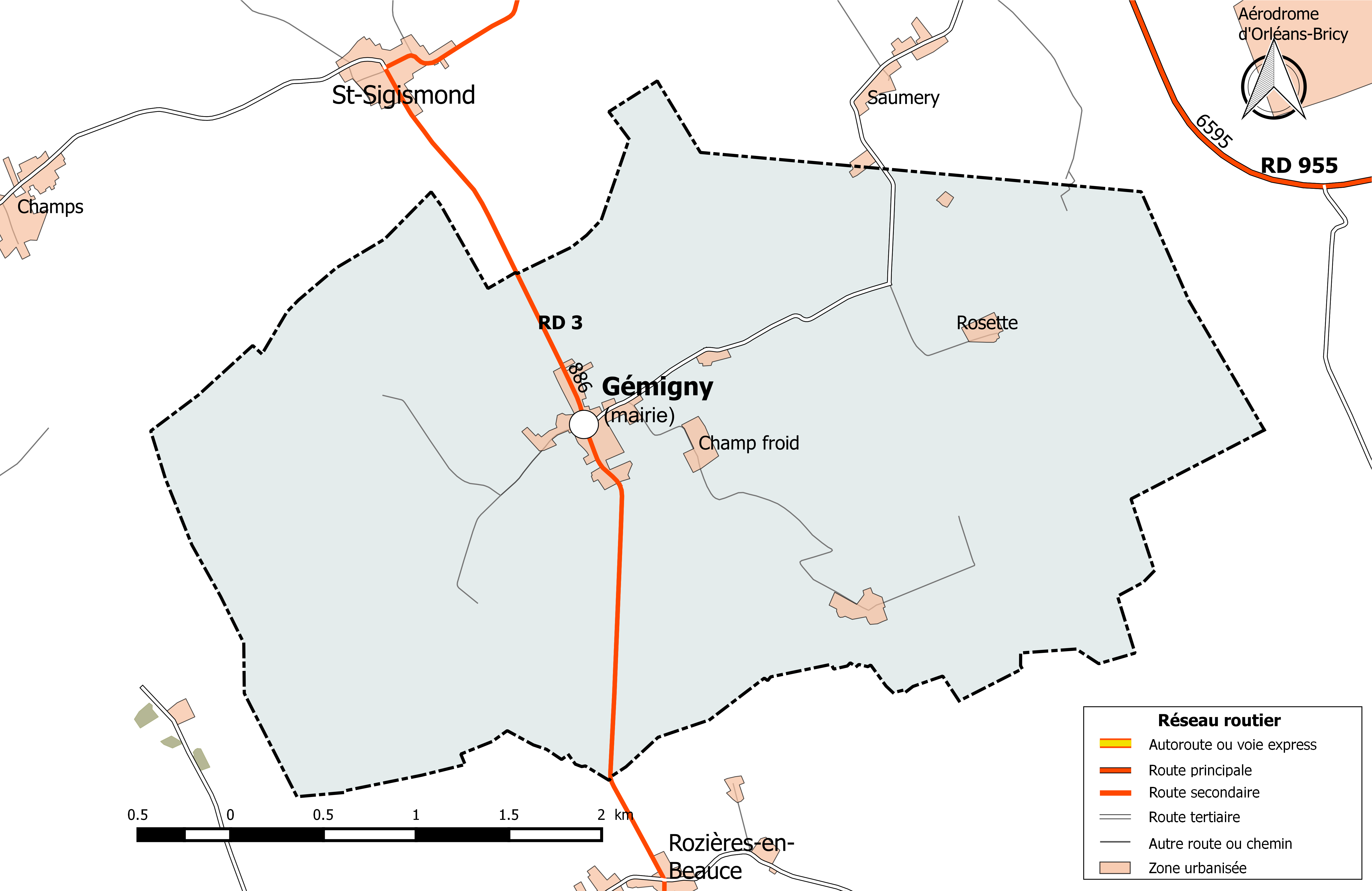 Carte du réseau routier de la commune de Gémigny.